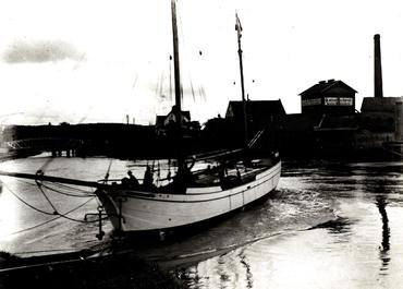 Stapellauf der Magdalena bei Johann Heinrich Fack